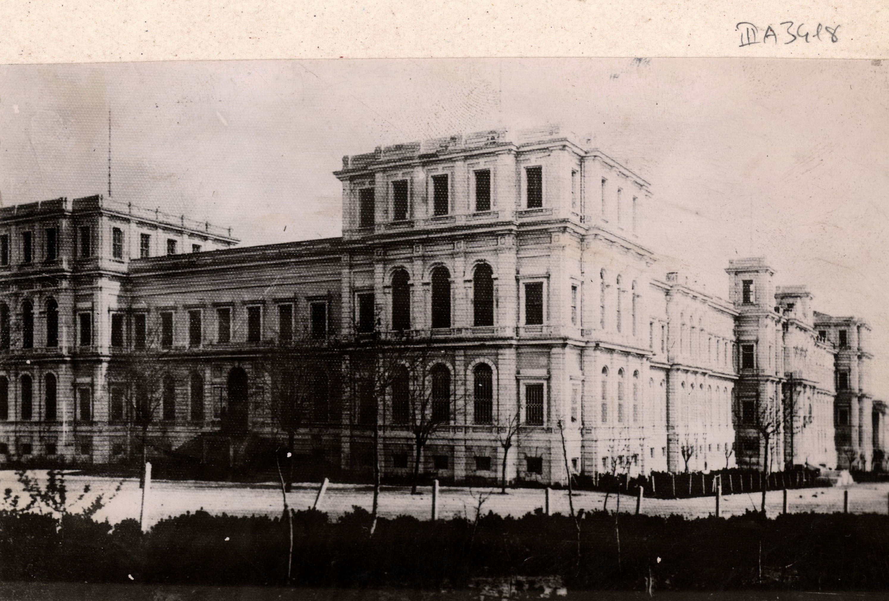 Maçka Armory, İstanbul Today, it is used as İstanbul Technical University Maçka Campus SALT Research, Ali Saim Ülgen Archive Maçka Silahhanesi, İstanbul Günümüzde İstanbul Teknik Üniversitesi Maçka Kampüsü olarak kullanılmaktadır. SALT Araştırma, Ali Saim Ülgen Arşivi